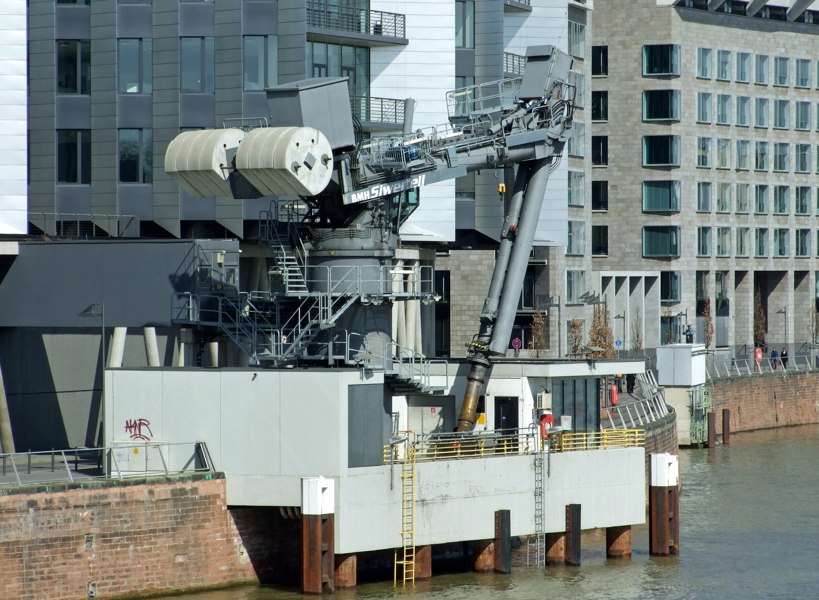 Anlegestelle (vor Westhafen Pier) mit einem Kran (Kohlesauger), der mittels einer archimedischen Schraube in seinem Rüssel die feingemahlene Kohle aus den Schiffen befördert. Über ein Förderband gelangt die Kohle durch die Bürogebäude des Westhafen Piers in das Heizkraftwerk West der Mainova.[1]